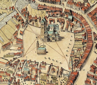 Ausschnitt aus dem Vogelschau-Plan der Stadt Münster von Everhard Alerdinck: Domplatz mit Dom und St. Jacobi